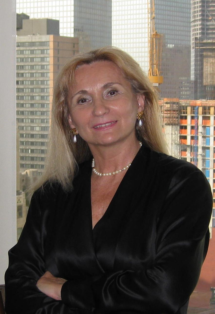 Lia Lungu, circa 2009